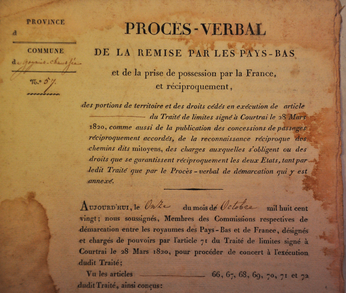 Procès-Verbal de la remise par les Pays-Bas et de la prise de possession par la France, et réciproquement des territoires de Goegnies-Chaussée